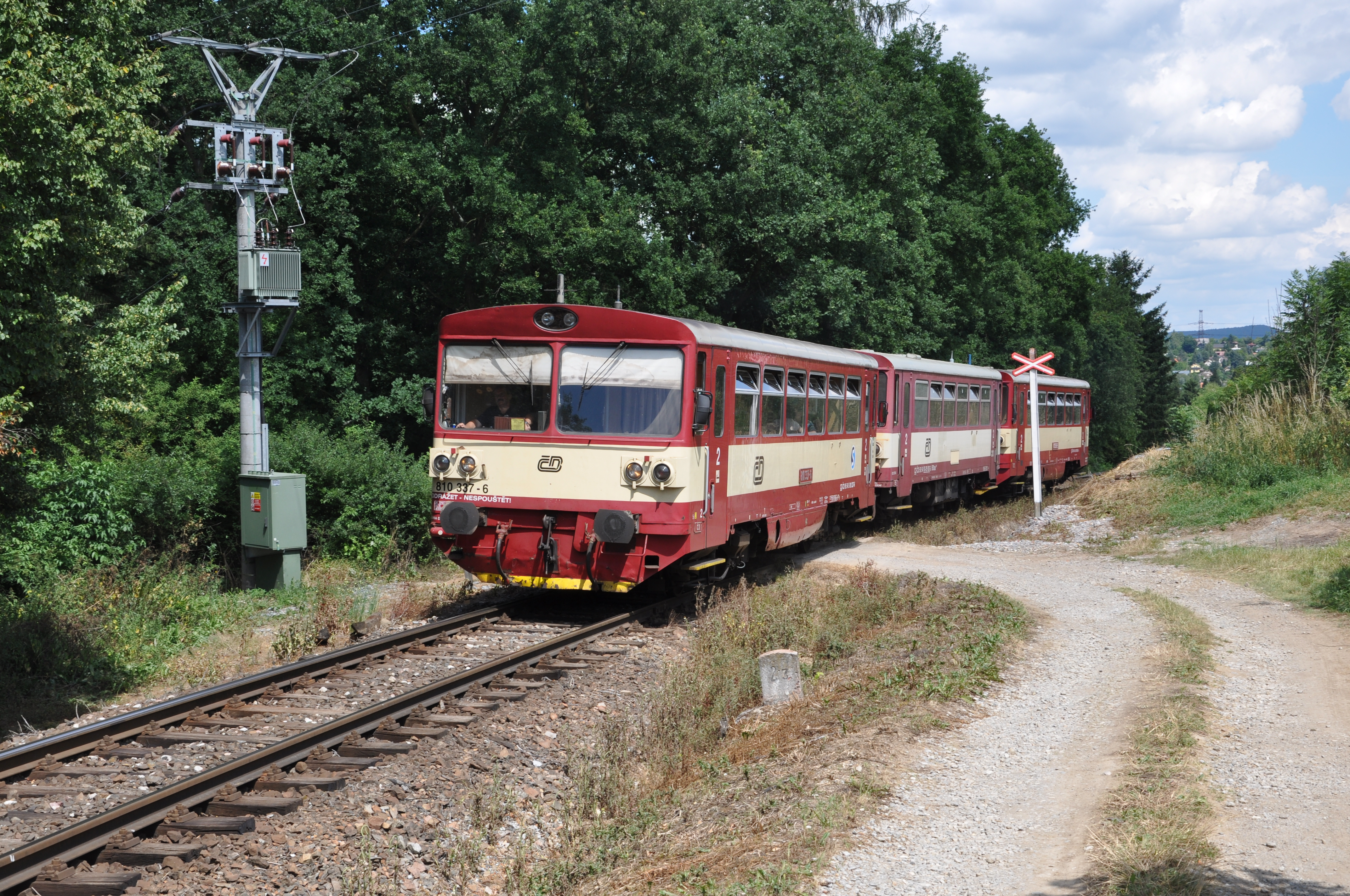 Reisezug am Kilometer 2,3 bei Běleč, Bahnstrecke Zadní Třebaň–Lochovice